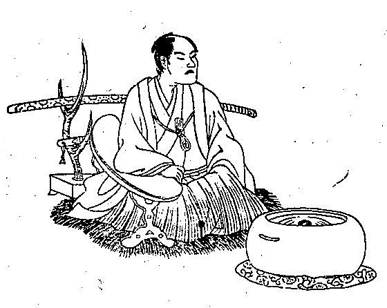 堀利煕